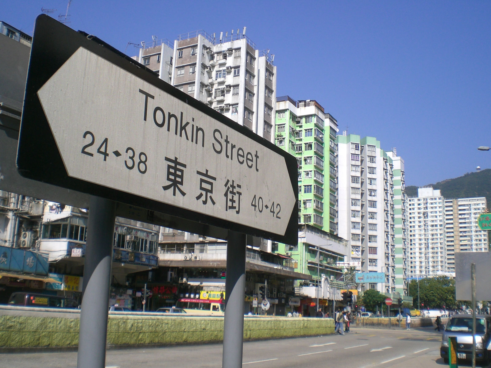 長沙灣東京街東京街渠